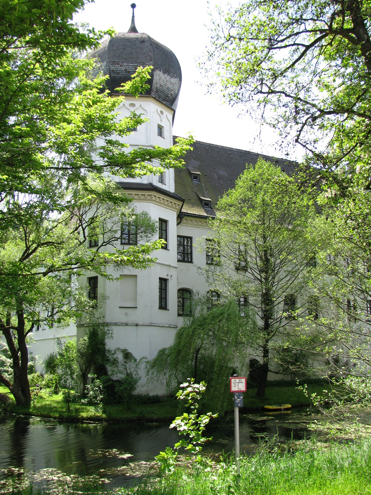 Schloss Schwindegg, ein Renaissance-Wasserschloss in der Ortsmitte von Schwindegg, einer ländlichen Gemeinde im oberbayerischen Landkreis Mühldorf am Inn. Turm an der Nordostseite der Anlage.